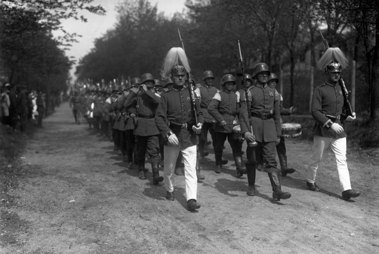 Denkmals-Einweihung für die im Weltkrieg gefallenen unter Beisein des Generalfeldmarschalls v. Hindenburg, des Reichswehr-Ministers Gessler und des Prinzen Eitel-Friedrich. Die Spitze der Reichswehr, geführt von ehemaligen Soldaten des Garde-Corps auf dem Wege zur Denkmals-Feier.